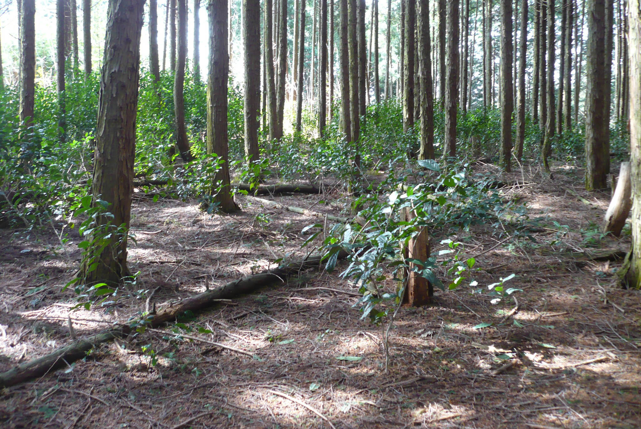 主郭